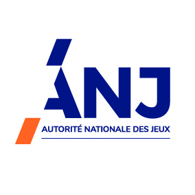 Logo de l'ANJ